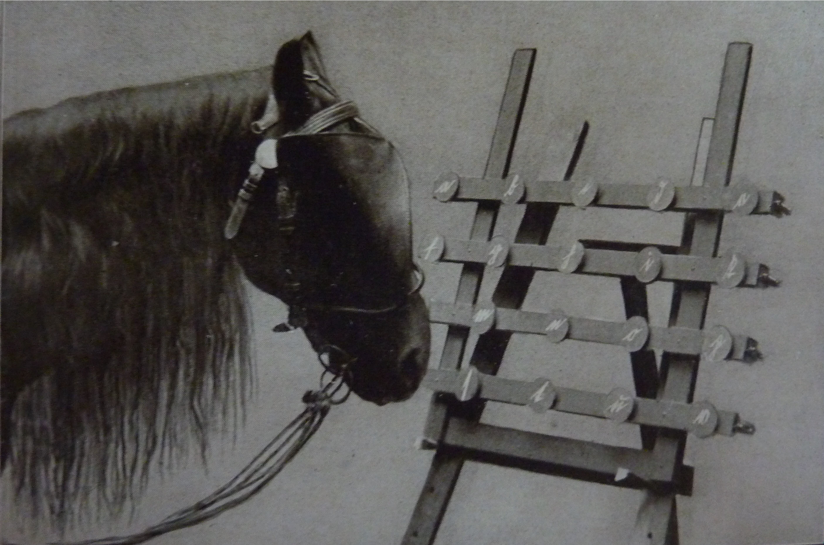 der kluge Hans an seiner "Schreibmaschine"